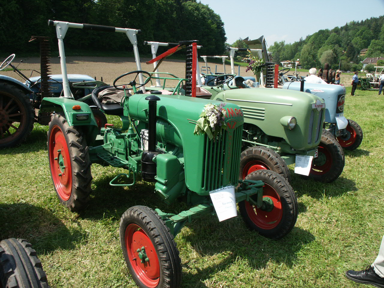 Normag-Zorge- bzw. Normag-Schlepper Kornett I (K12a), Baujahr 1956, Leistung: 12 PS, Hubraum: 1274 ccm, Leergewicht: 1050 kg, zulässiges Gesamtgewicht: 1400 kg, Vorderachsdruck: 600 kg, Hinterachsdruck: 850 kg